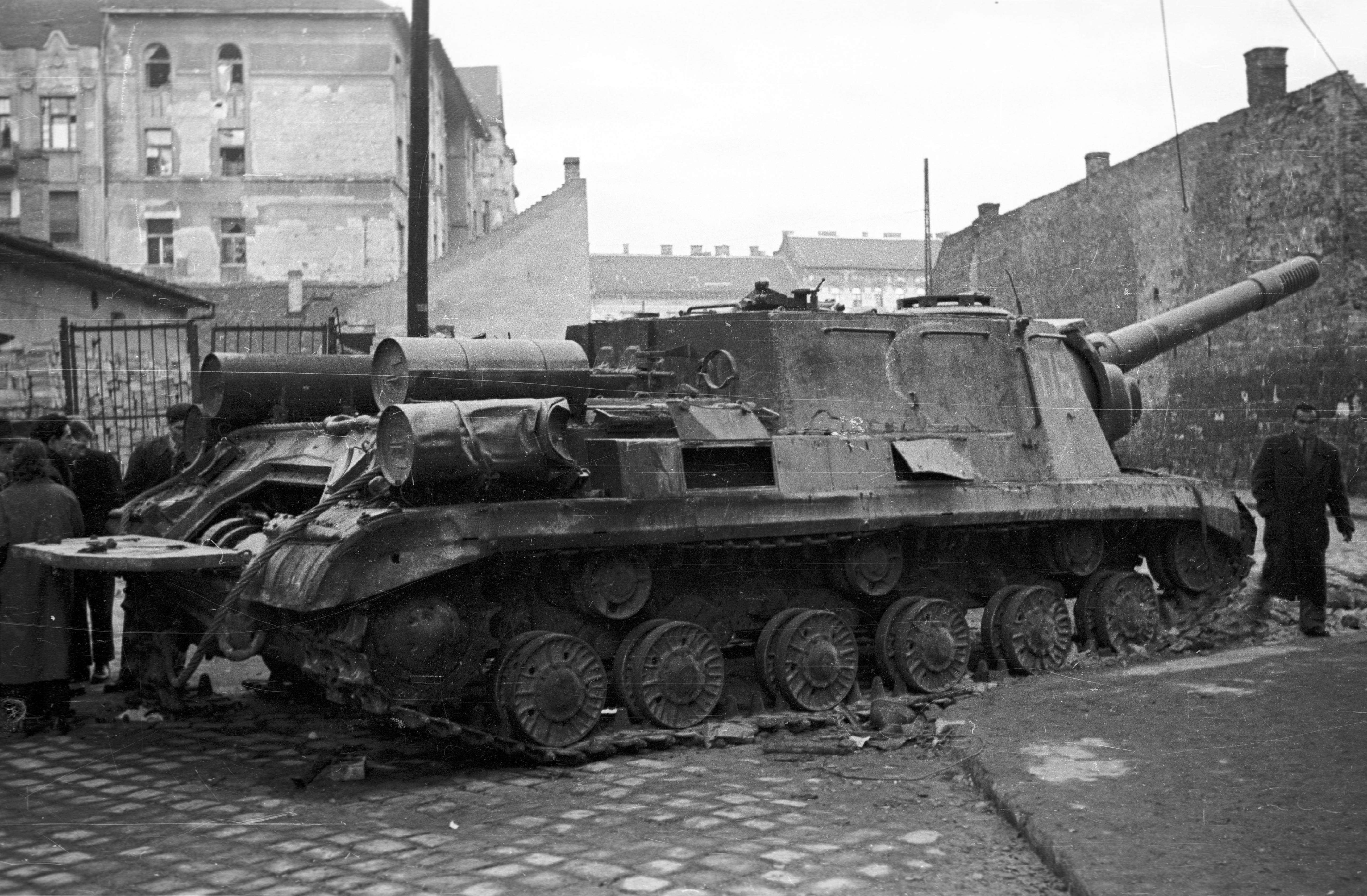 Déri Miksa utca - Auróra utca sarok a Nagyfuvaros utca felé nézve. Harcképtelenné tett ISU-152-es szovjet rohamlöveg. Location: Hungary, Budapest VIII. Tags: wreck, Soviet brand, combat vehicle, ISU-152 assault gun, Budapest, revolution Title: Déri Miksa utca - Auróra utca sarok a Nagyfuvaros utca felé nézve. Harcképtelenné tett ISU-152-es szovjet rohamlöveg.